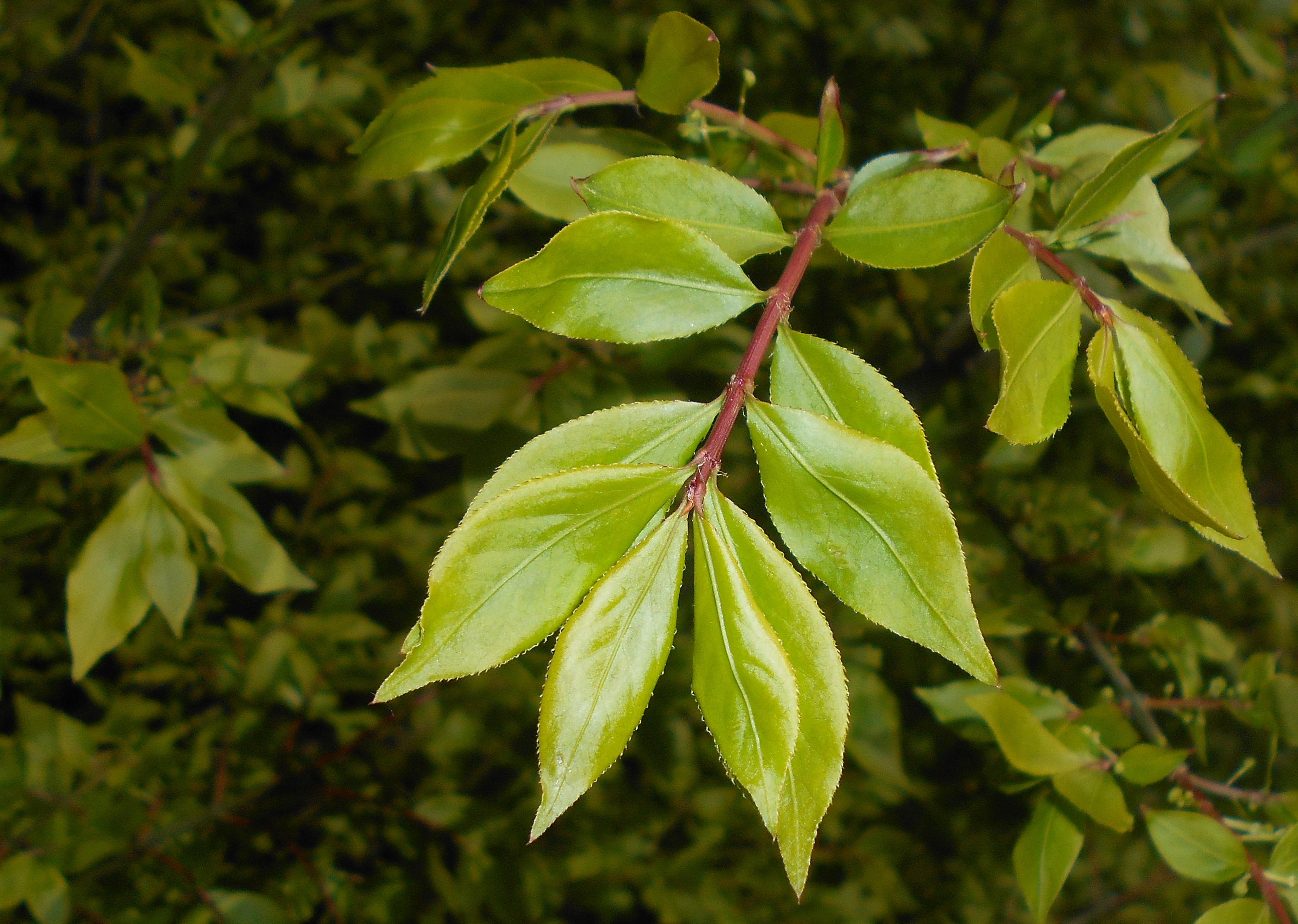 Trzmielina oskrzydlona (Euonymus alatus), Ogród Botaniczny UMCS w Lublinie